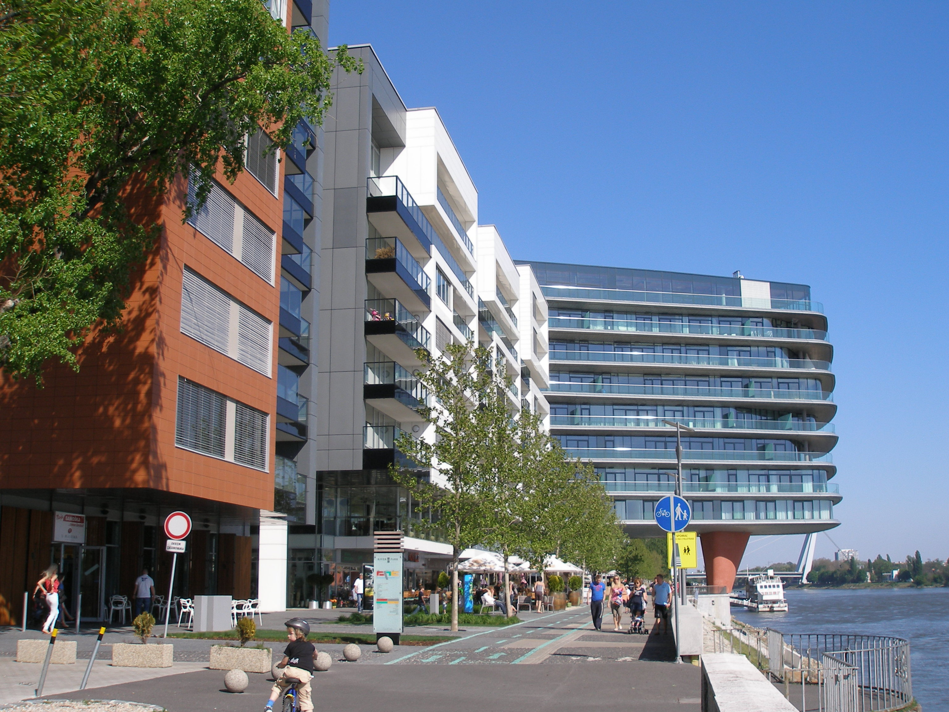 River Park pri rieke Dunaj Bratislava